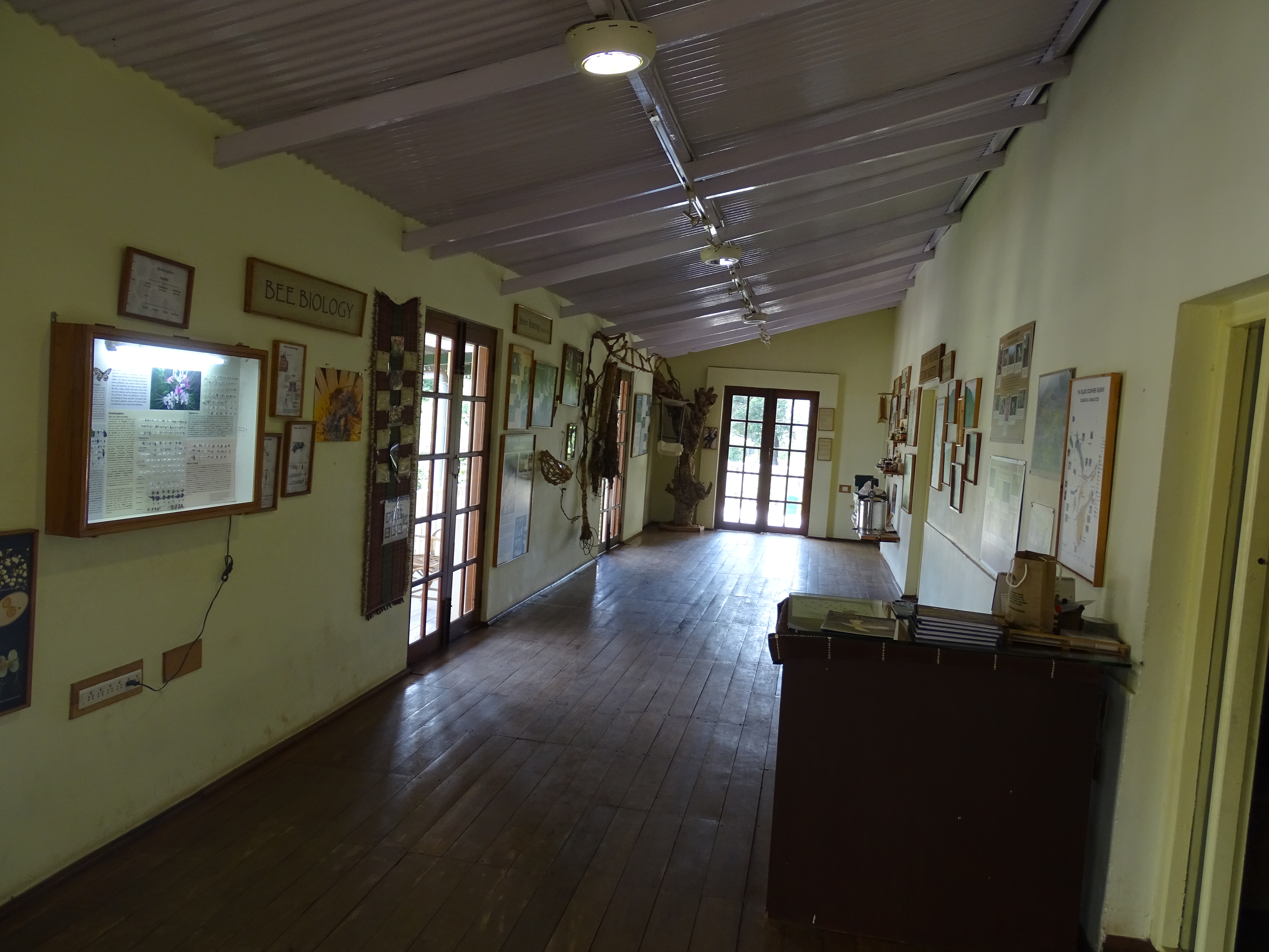 Honey & Bee Museum, Ooty